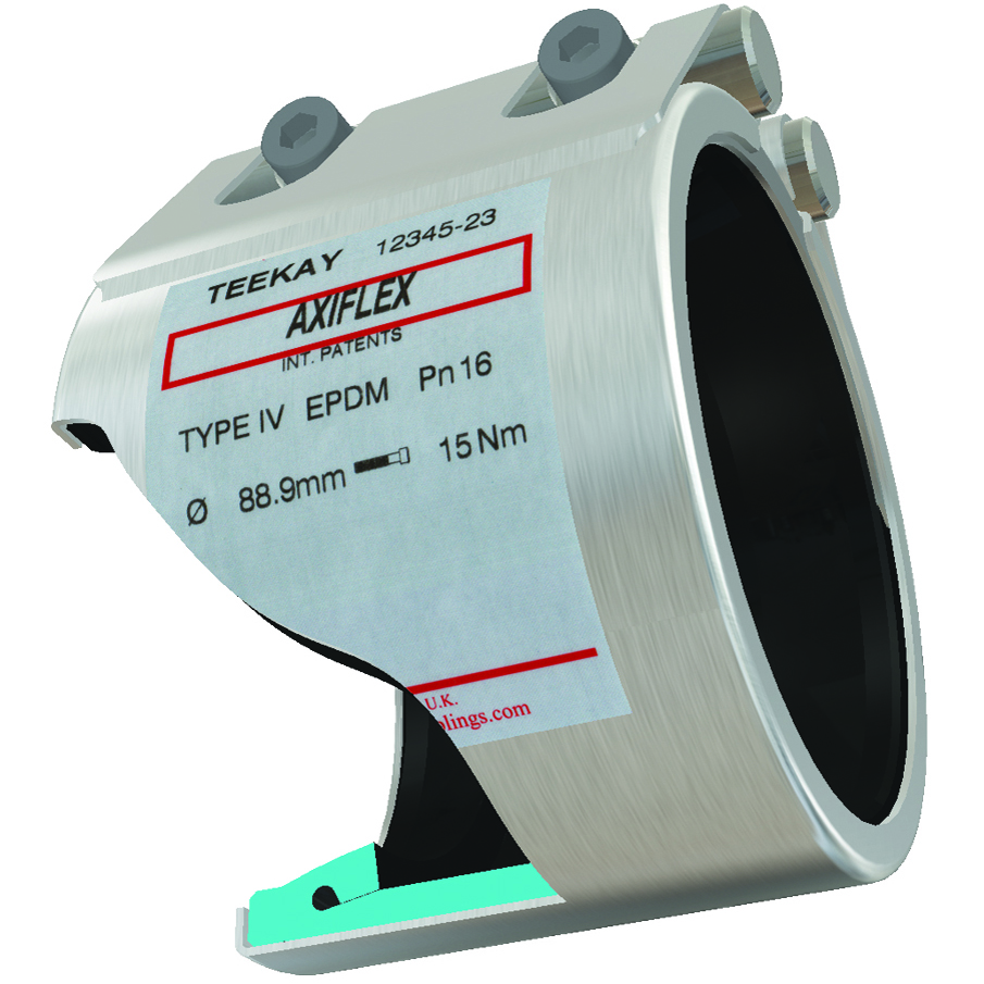 Beispiel einer Teekay-Axiflex-Schnellkupplung.